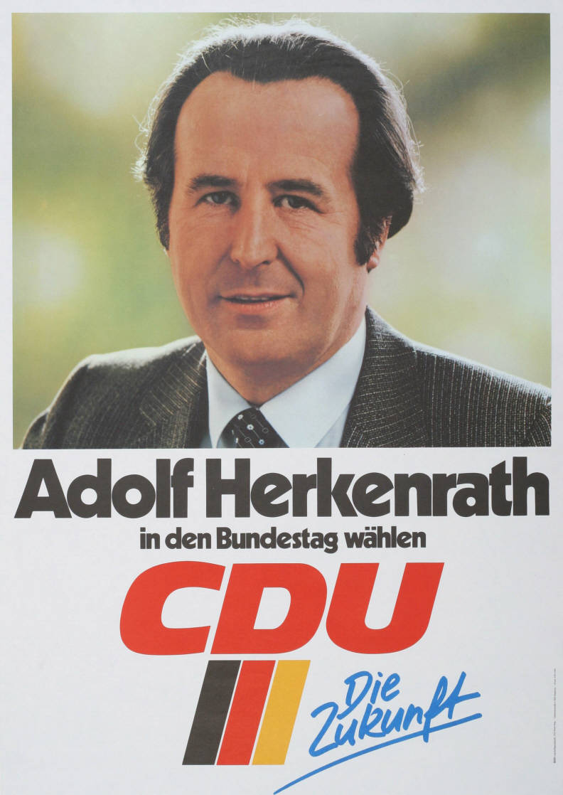 Adolf Herkenrath in den Bundestag wählen CDU Die Zukunft Abbildung: Porträtfoto Plakatart: Kandidaten-/Personenplakat mit Porträt Auftraggeber: Verantw.: CDU Rhein-Sieg, Siegburg Drucker_Druckart_Druckort: KVD, Köln Objekt-Signatur: 10-001: 2907 Bestand: Plakate zu Bundestagswahlen (10-001) GliederungBestand10-18: Plakate zu Bundestagswahlen (10-001) » Die 11. Bundestagswahl am 25. Januar 1987 » CDU » Mit Porträtfoto Lizenz: KAS/ACDP 10-001: 2907 CC-BY-SA 3.0 DE